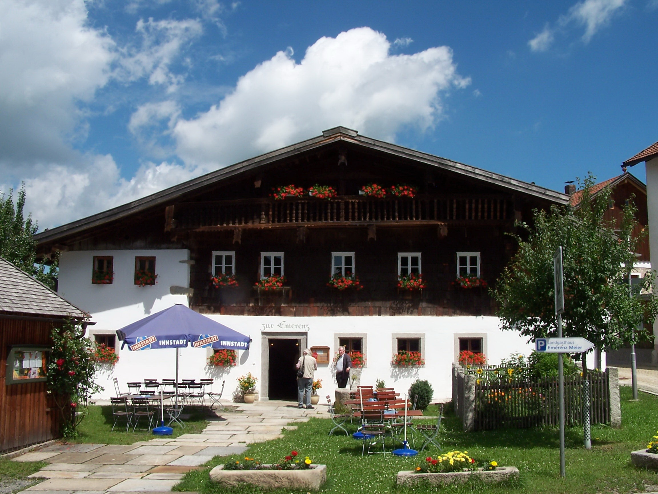 Waldkirchen, Schiefweg, Dorfplatz 9. Ehem. Gasthaus, teilweise verschindelter Obergeschoss-Blockbau, Hochlaube mit Balustern, seitlicher Schopf im Blockbau, 1. Hälfte 18. Jahrhundert; Geburtshaus der Bayerwald-Dichterin Emerenz Meier. Museum im Obergeschoss.